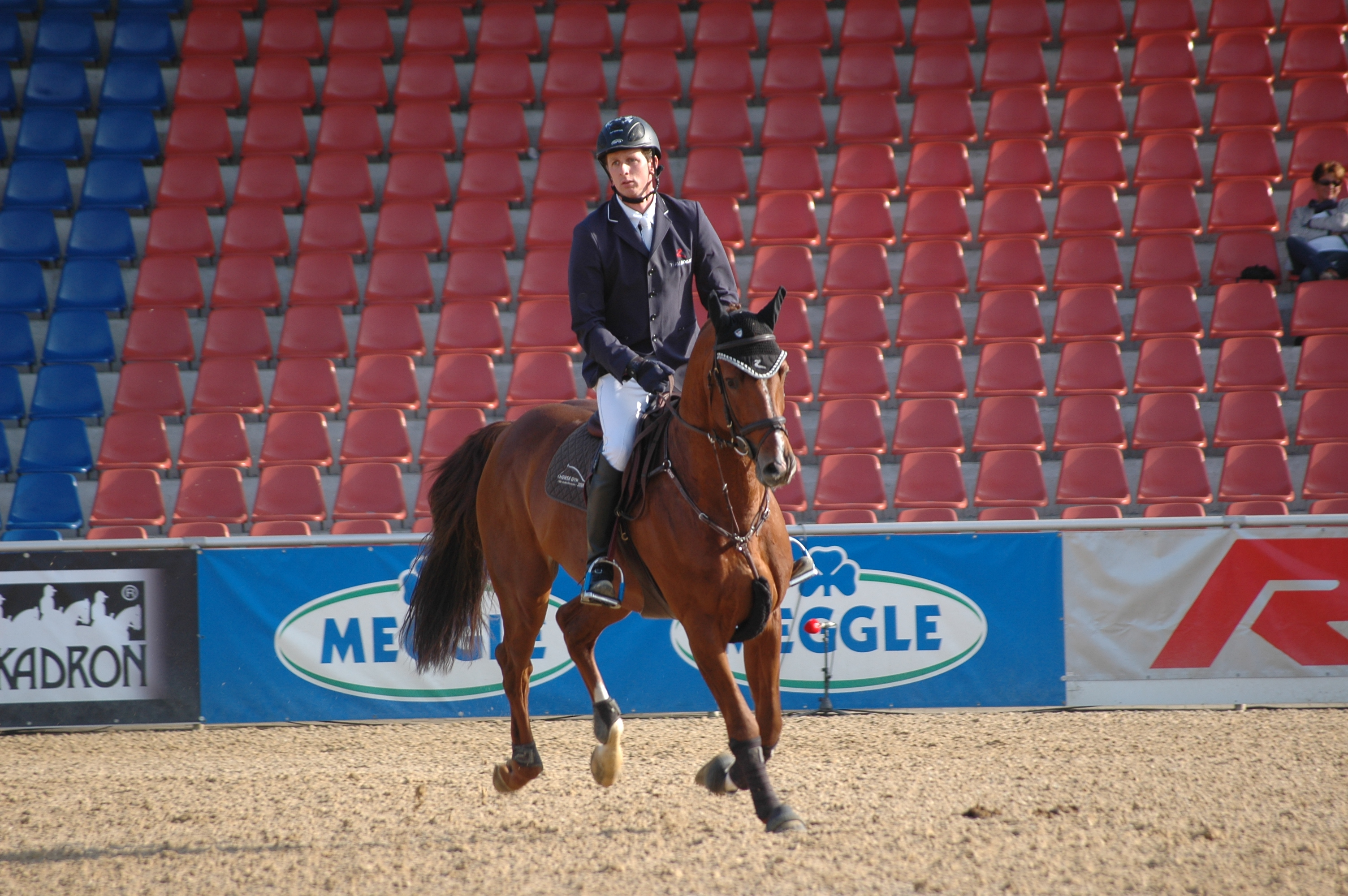 51. Maimarkt-Turnier:Felix Haßmann mit Horse Gym's Balzaci